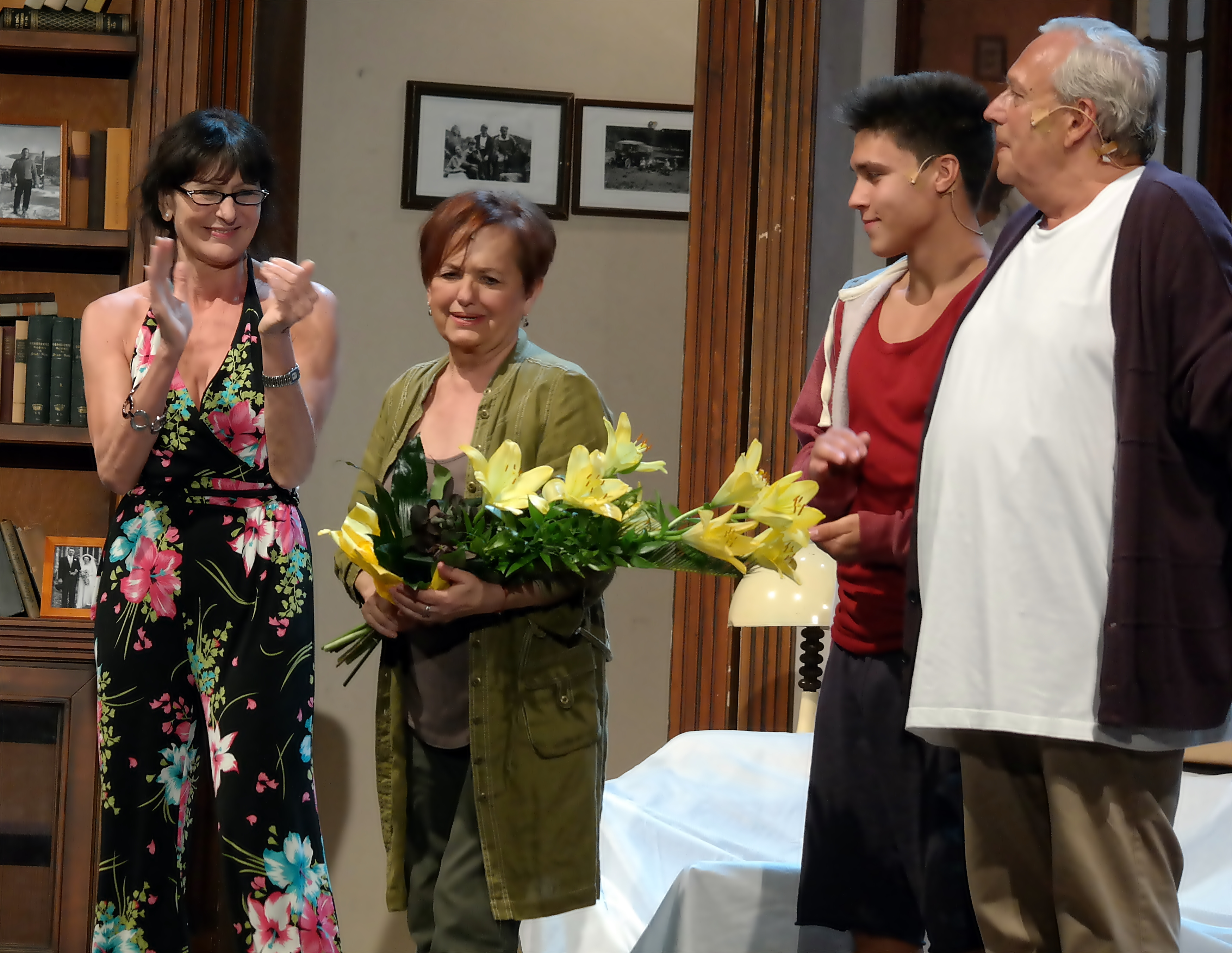 Vári Éva köszöntése, a városmajori búcsúelőadásán. Balról-jobbra: Bán Teodóra, Vári Éva, Szekeres Máté, Benedek Miklós (Budapest, XII. kerület, Városmajori Szabadtéri Színpad)